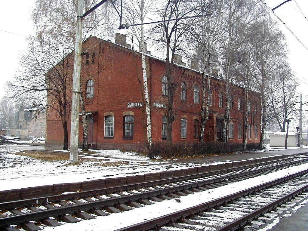 Šķirotavas stacija Rīgā 2002-11-10